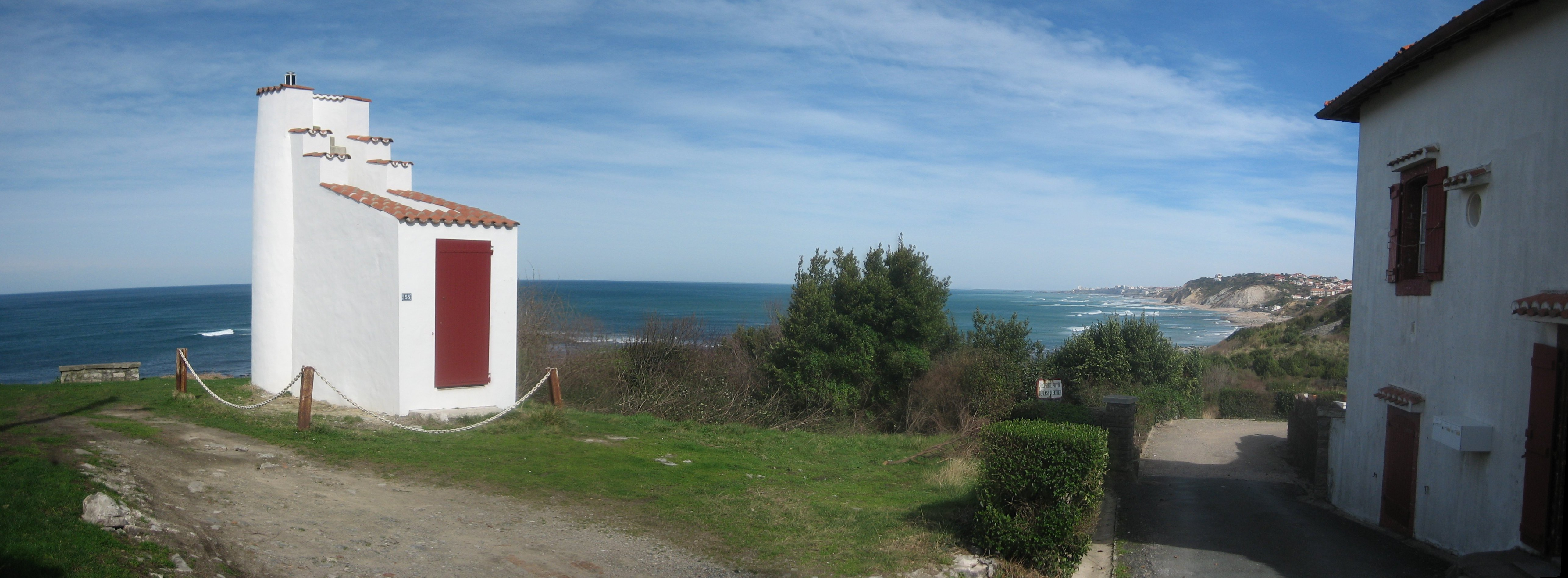 Le sémaphore est précisément dans Bidart, à la limite de Guéthary. Il surplombe la plage de Parlementia.